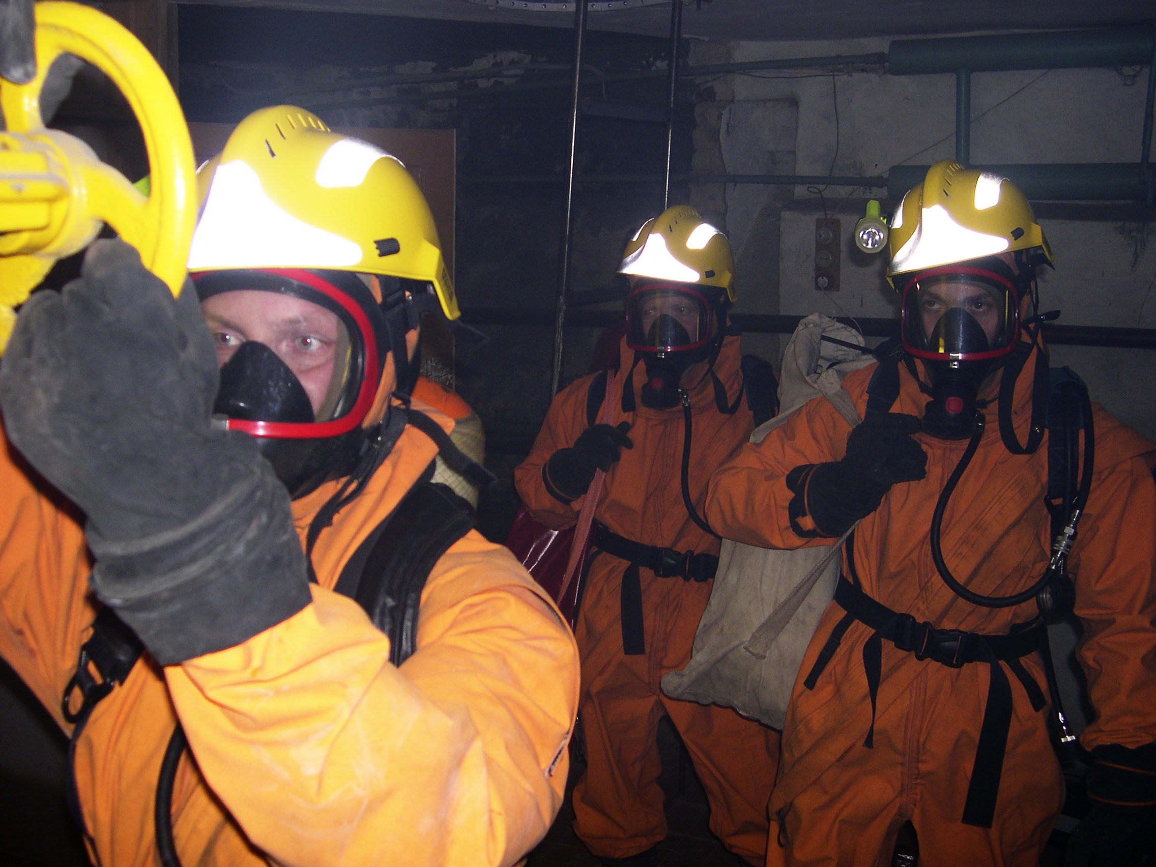 Занятия на кафедре ГССиФ